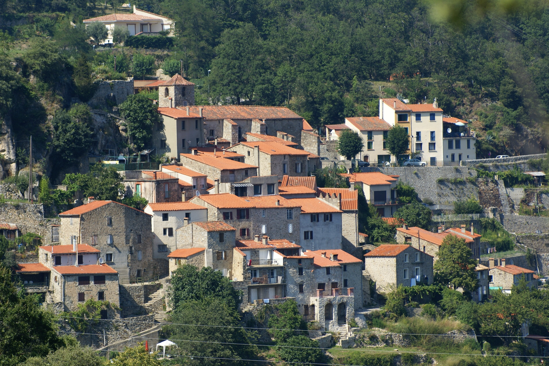 Corsavy dans le Haut-Vallespir 66150 (Pyrénées-Orientales, Languedoc Roussillon, France)